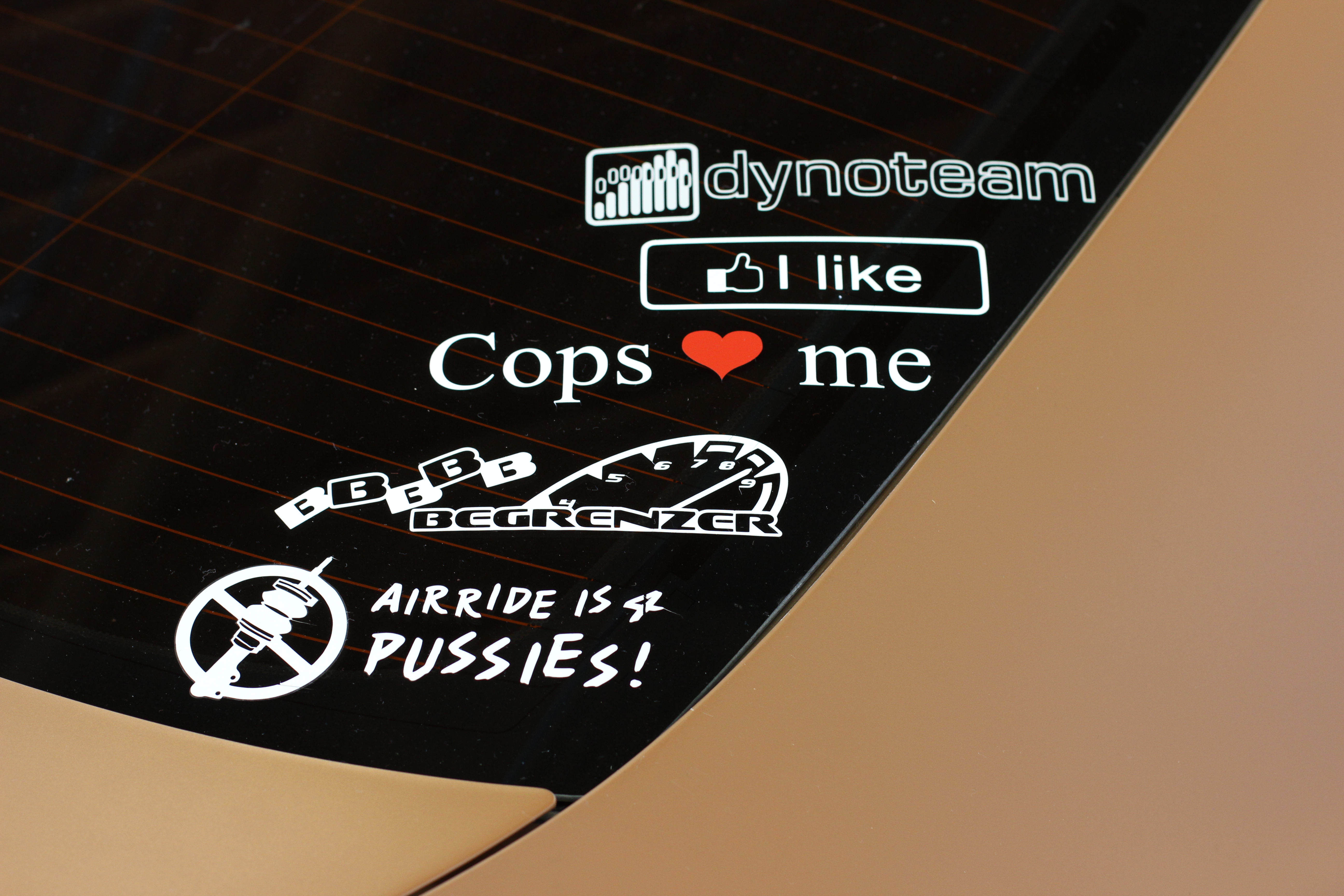 Diverse Autoaufkleber der Tuner-Szene auf einer Heckscheibe